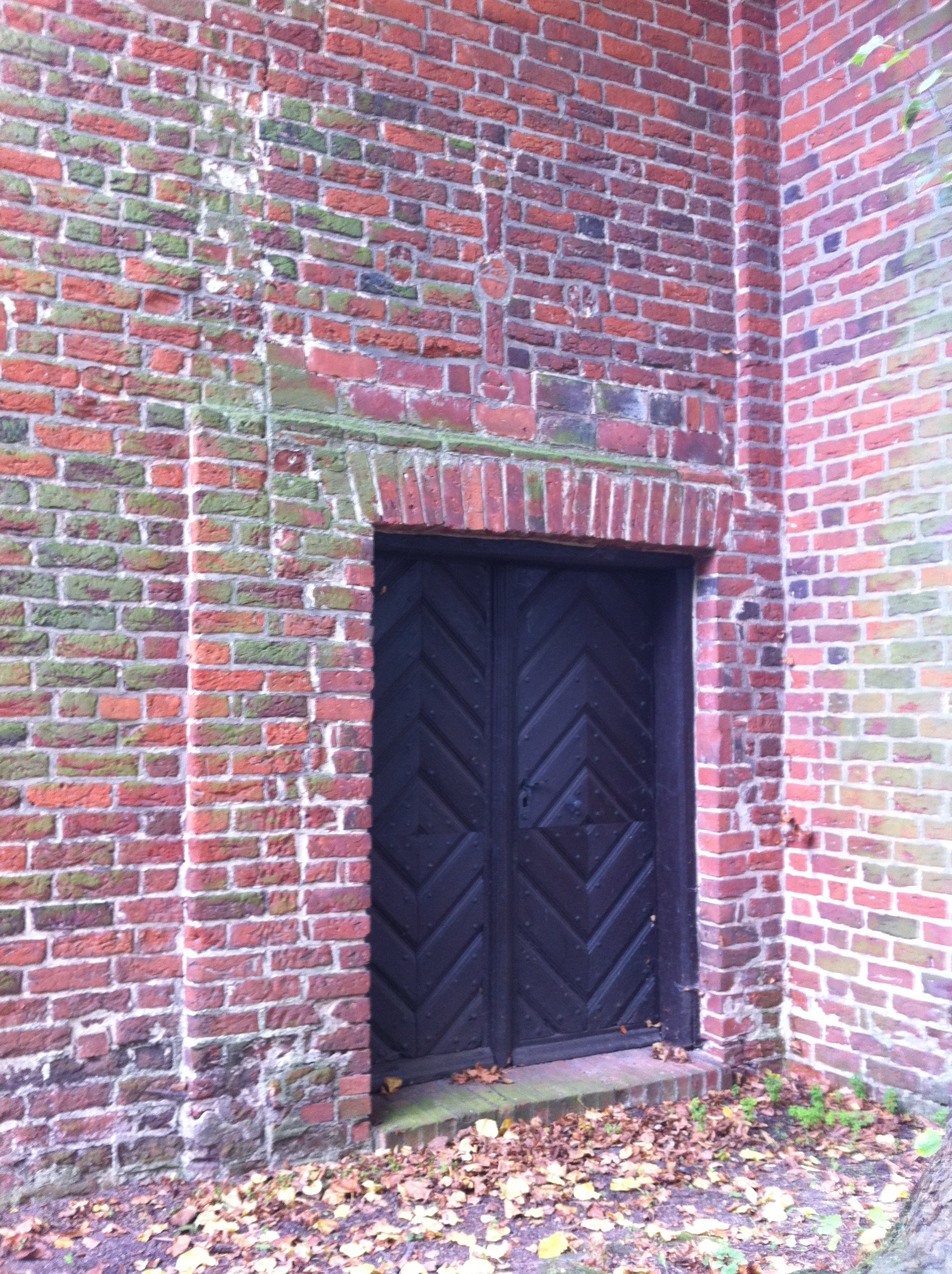 Dorfkirche Roßdorf, Priesterpforte mit eingelegtem Tatzenkreuz